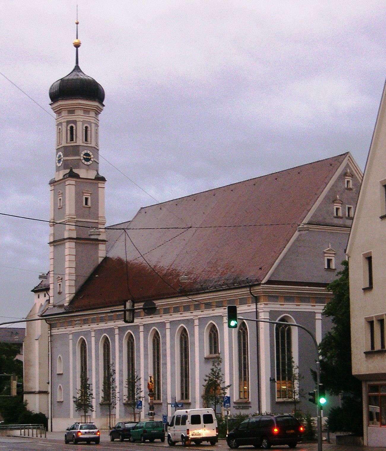 Ulm, Dreifaltigkeitskirche